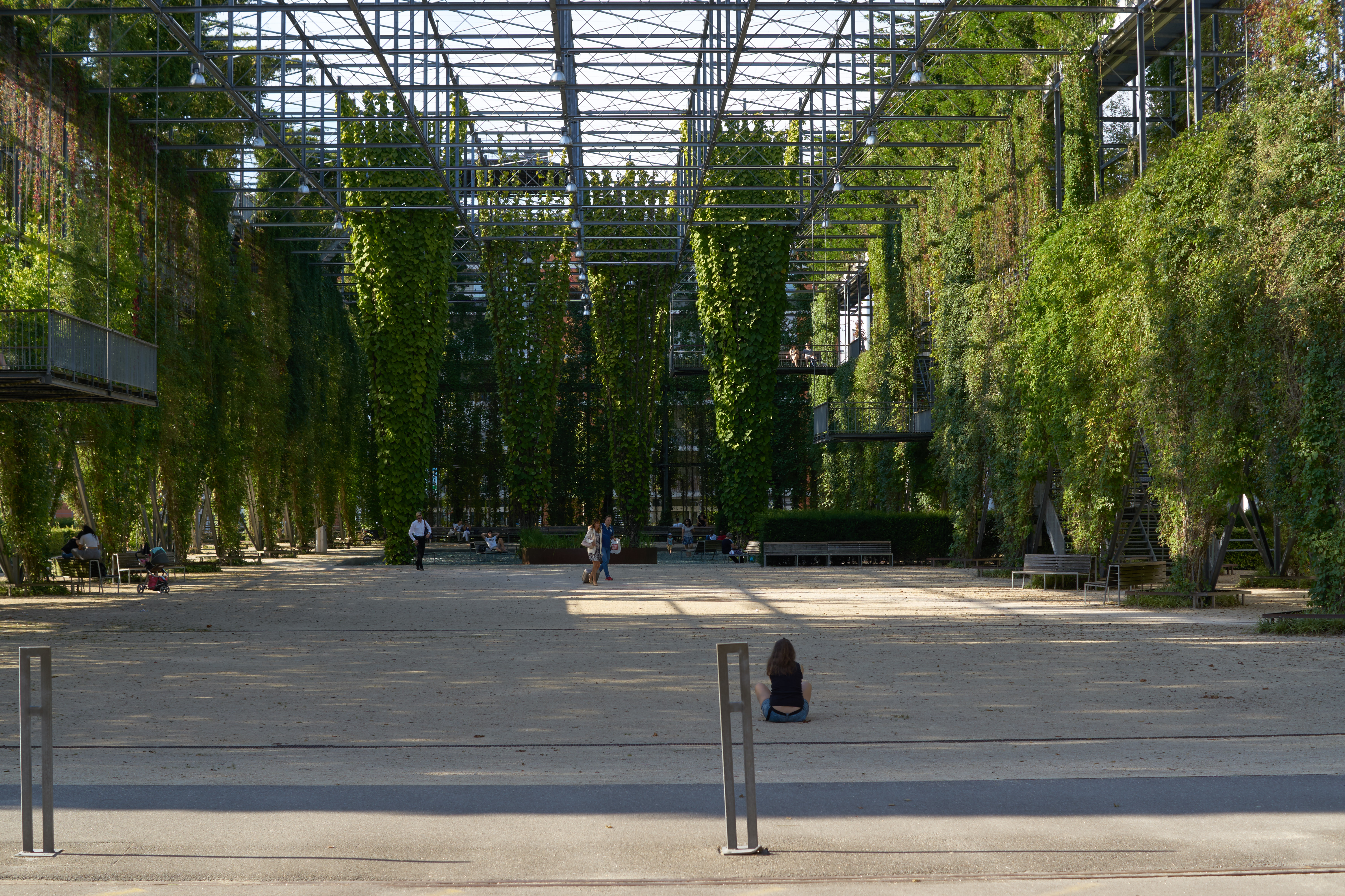 Aufgenommen im 2016